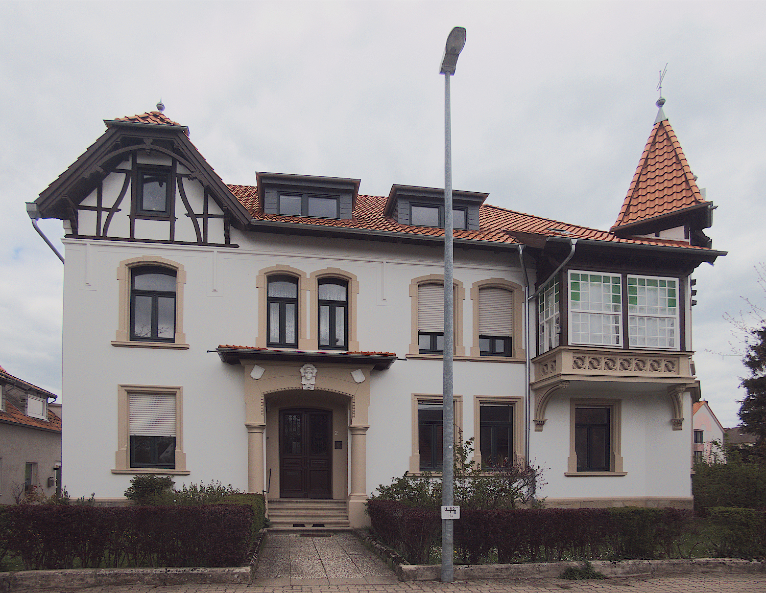 Denkmageschützte Villa in der Neuwerkstraße in Gehrden, Region Hannover